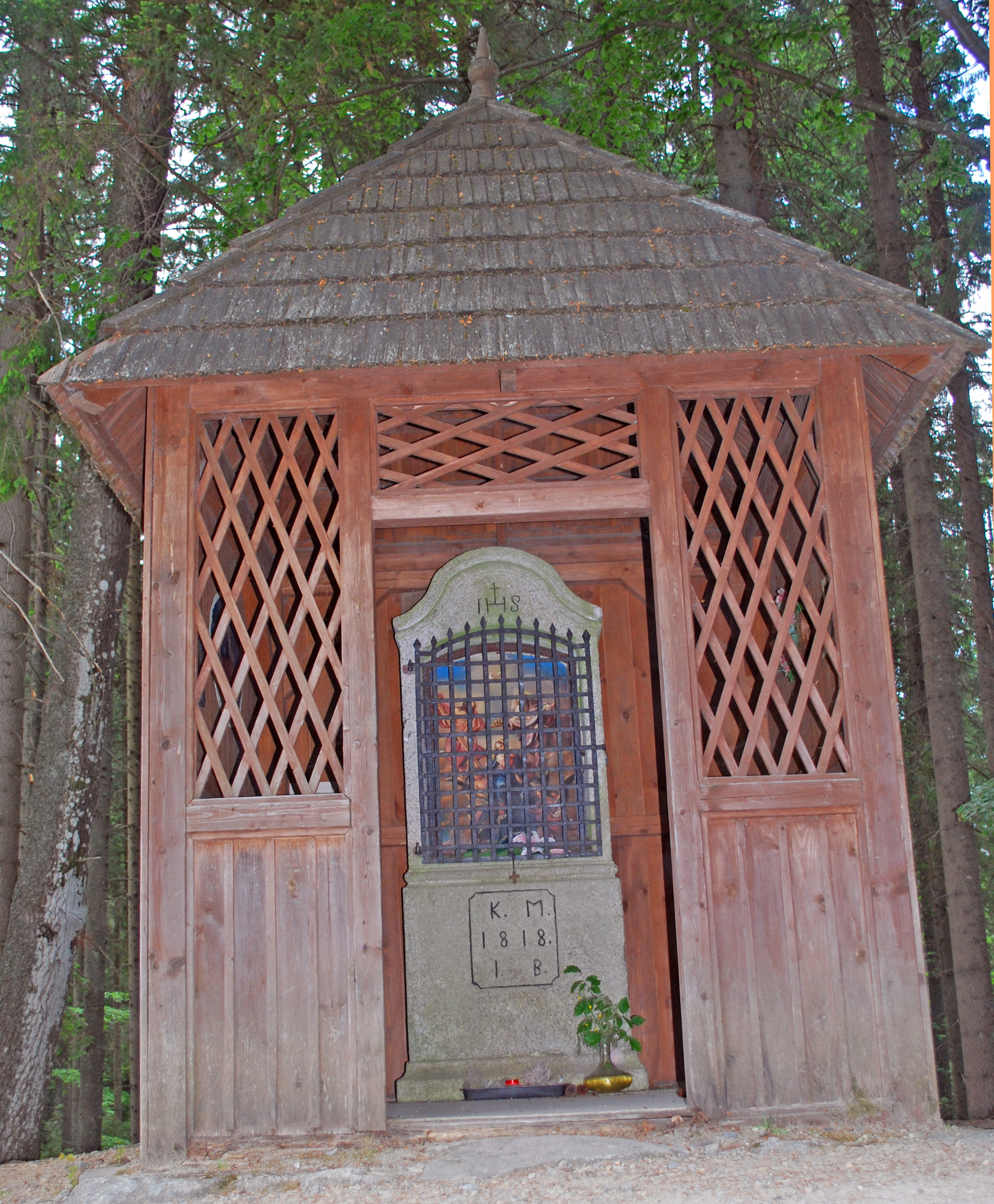 Rosenauerkapelle